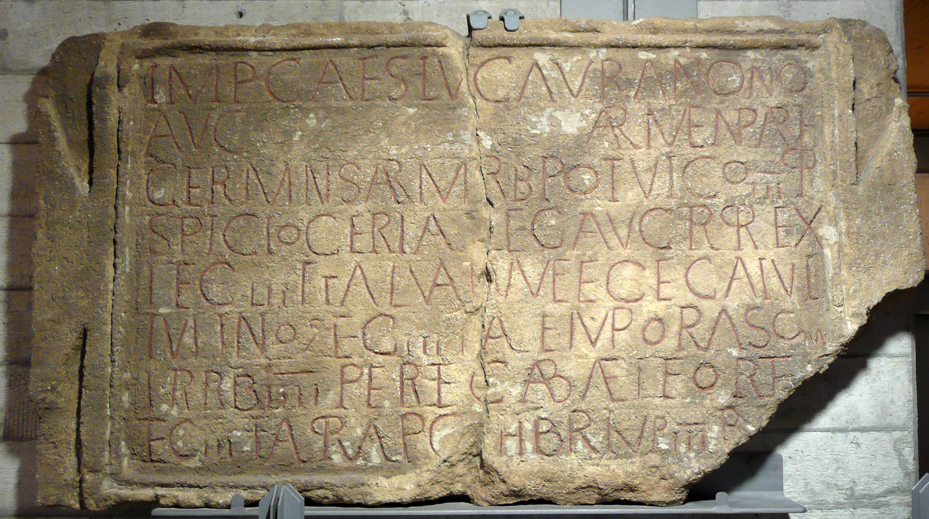 CIL 03, 14370,02 Imp(eratore) Caes(are) Luc(io) Aur(elio) Antoni(n)o Aug(usto) [Commodo] Armen(iaco) Parth(ico) Germ(a)n(ico) Sarm(atico) trib(unicia) pot(estate) VI co(nsule) III p(atre) p(atriae) Spicio Ceriale leg(ato) Aug(usti) pr(o) pr(aetore) vex(illarii) leg(ionis) III Ital(icae) vallum fece(runt) c(uram) a(gente) Iul(io) Iulino (centurione) leg(ionis) III Ital(icae) item portas cum turrib(us) IIII perfec(tas) ab Ael(io) Forte (centurione) leg(ionis) III Ital(icae) praep(osito) coh(ortis) I Br(eucorum) imp(eratore) III Bur[ro co(n)s(ulibus)]